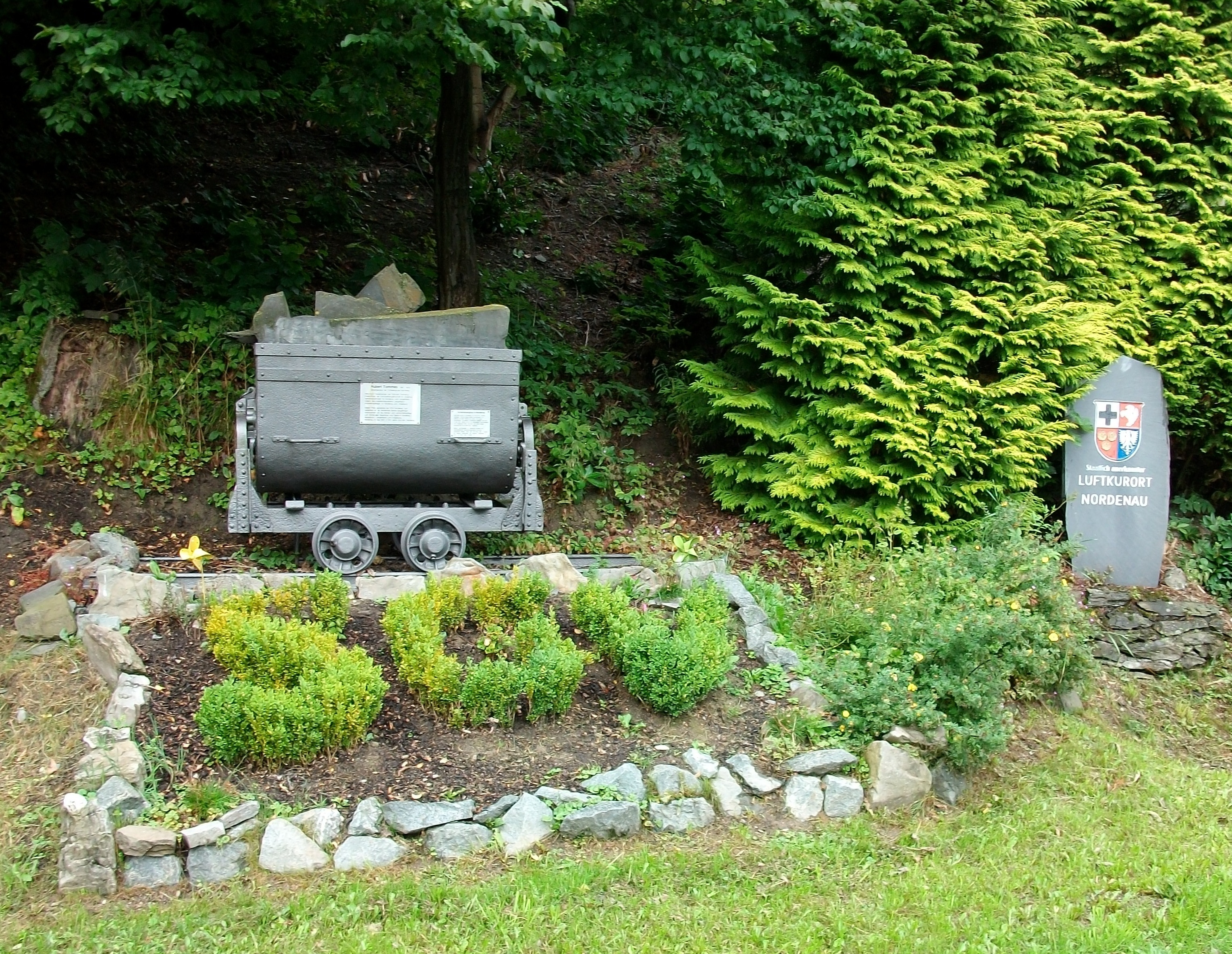 Schmallenberg-Nordenau, SGV-Platz mit Förderwagen aus dem Schieferbergbau (Germany)